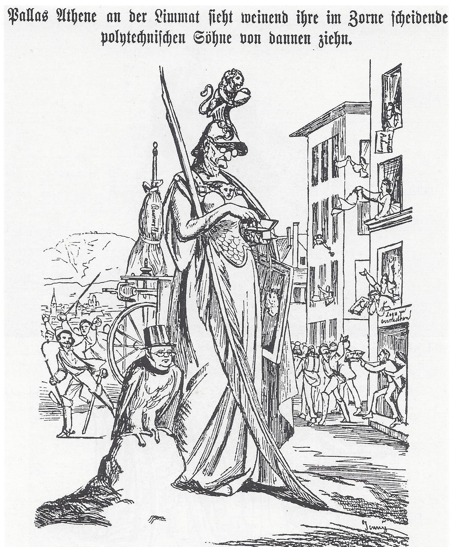 Karikatur auf den Auszug der Studenten des Eidgenössischen Polytechnikums als Protest gegen das autoritäre Direktorat.